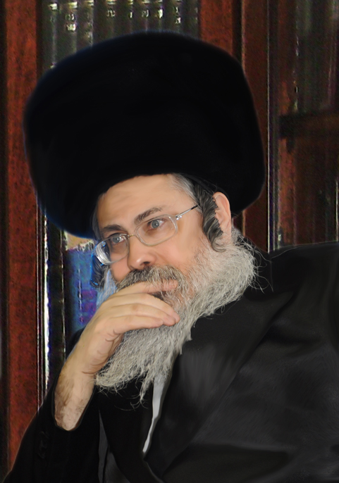 תמונה של האדמור מטאלנא